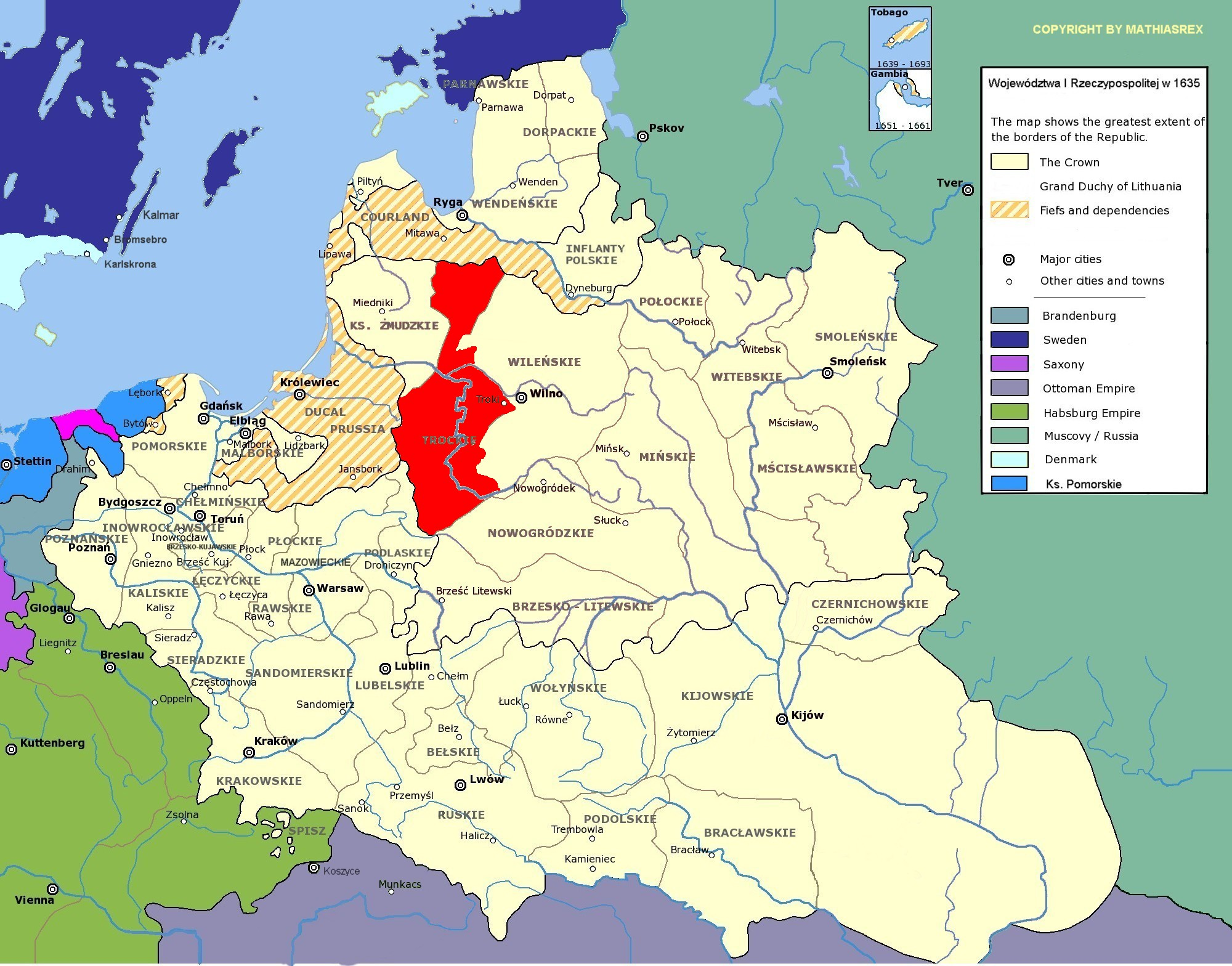 województwo trockie I Rzeczypospolitej author-Maciej Szczepańczyk-user Mathiasrex